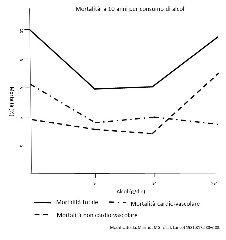 Curve della mortalità a 10 anni per consumo di alcol